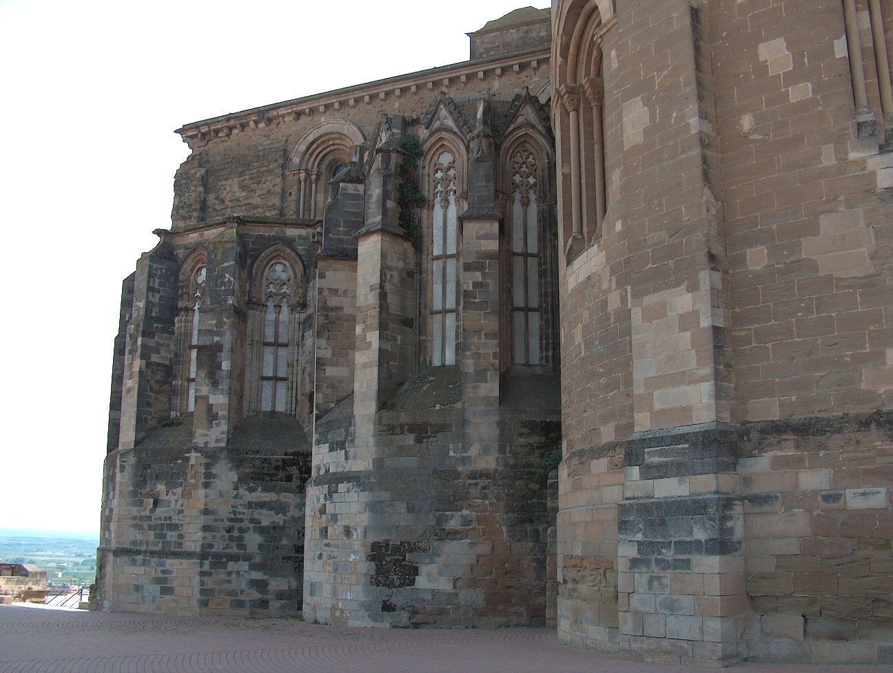 Sé Velha de Lérida. Sé Velha de Lérida em Espanha.